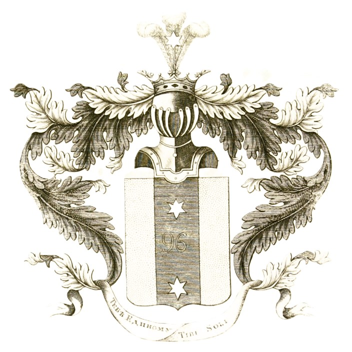 Gerb Deistvitel'nago Tainago Sovetnika Donaurova.